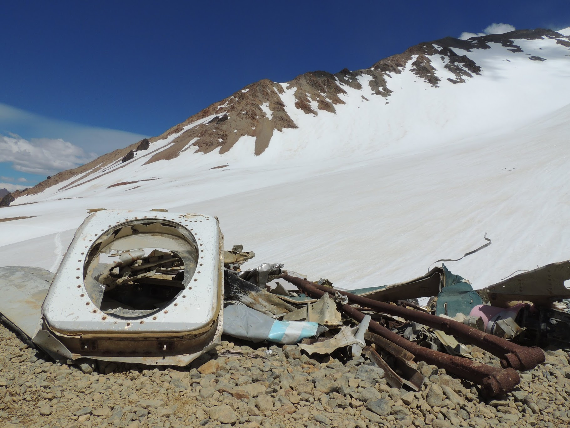 Restos de la aeronave que se conservan en el lugar del accidente del Vuelo 571 de la Fuerza Aérea Uruguaya ocurrido el 13 de octubre de 1972.